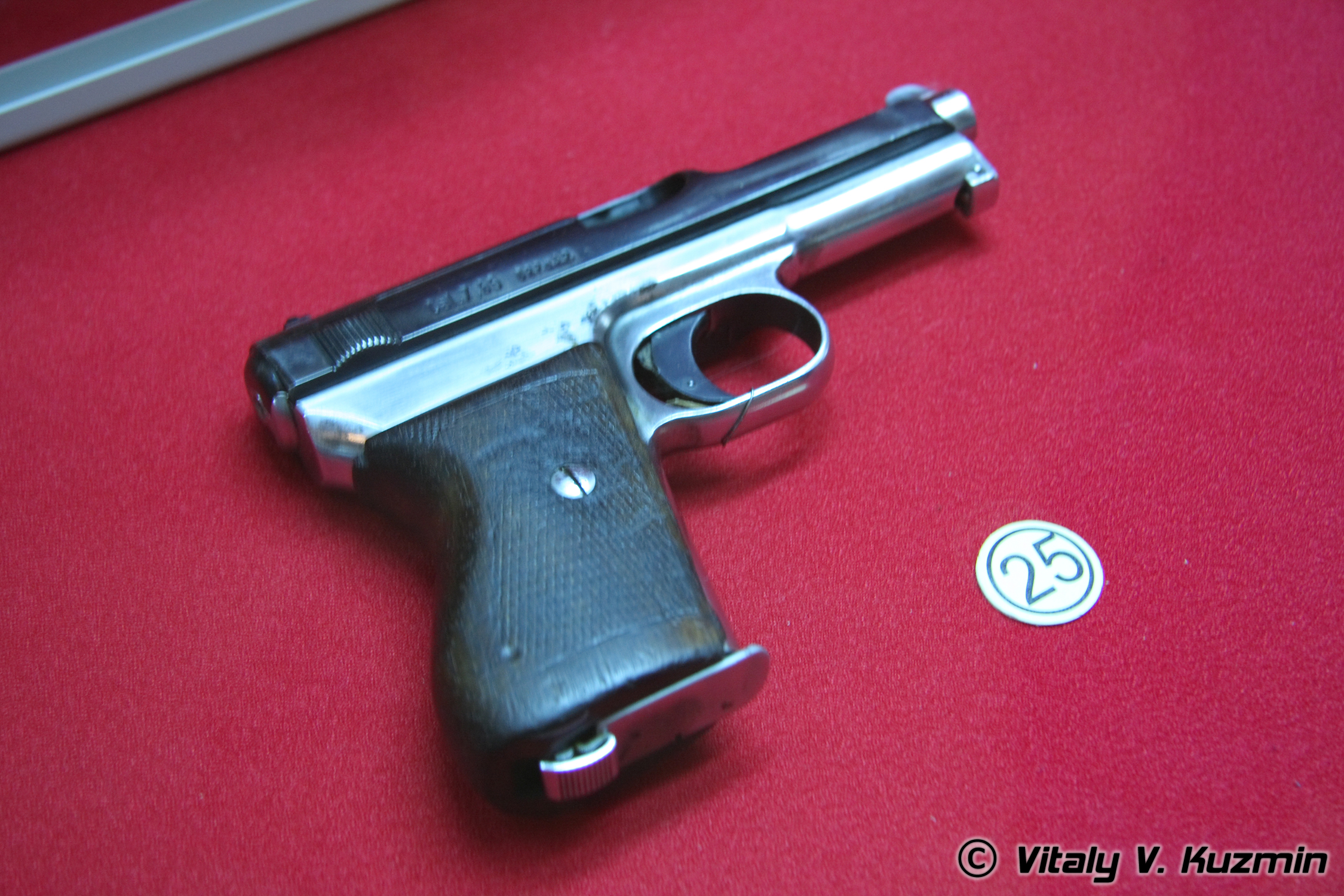 Маузер мод. 1910/1934 (Mauser mod. 1910/1934 years)